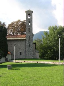 Chiesa di Quarcino, Como (frazione Sagnino) - Google Maps - Google Earth